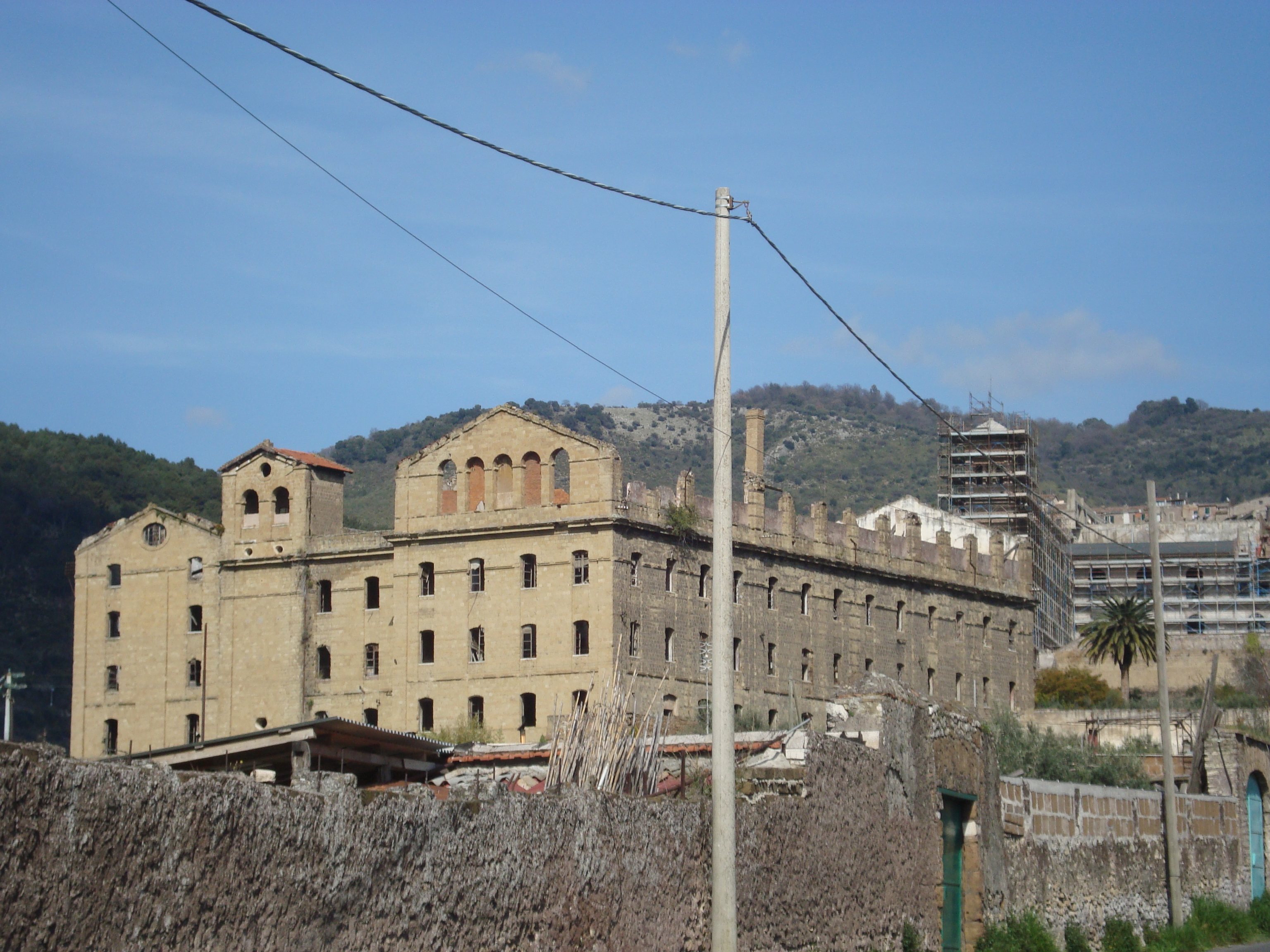 Les anciennes usines de papier de Tivoli